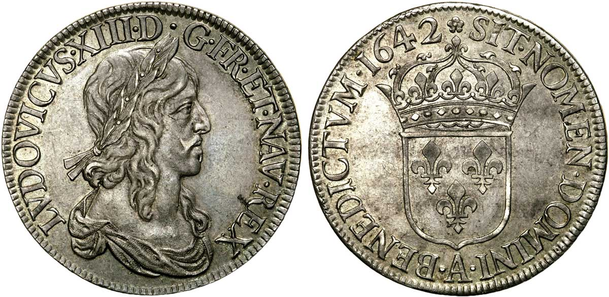 Louis XIII le Juste Écu d’argent, 1er poinçon de Warin 1642 Paris